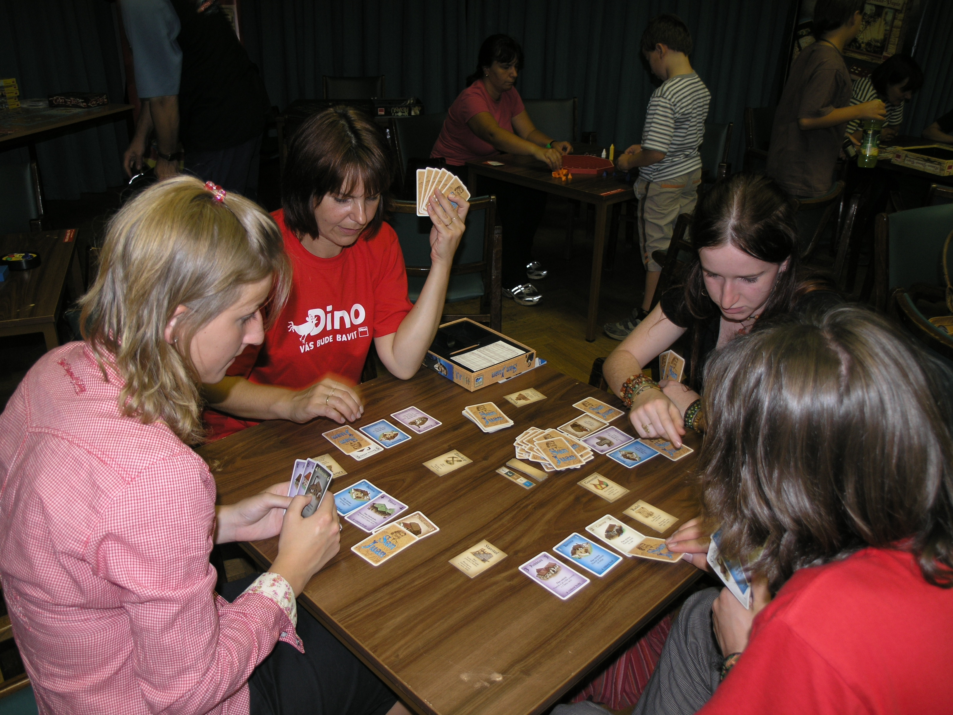 Hry a hlavolamy 2008 - festival her a hlavolamů v Praze, Holešovicích